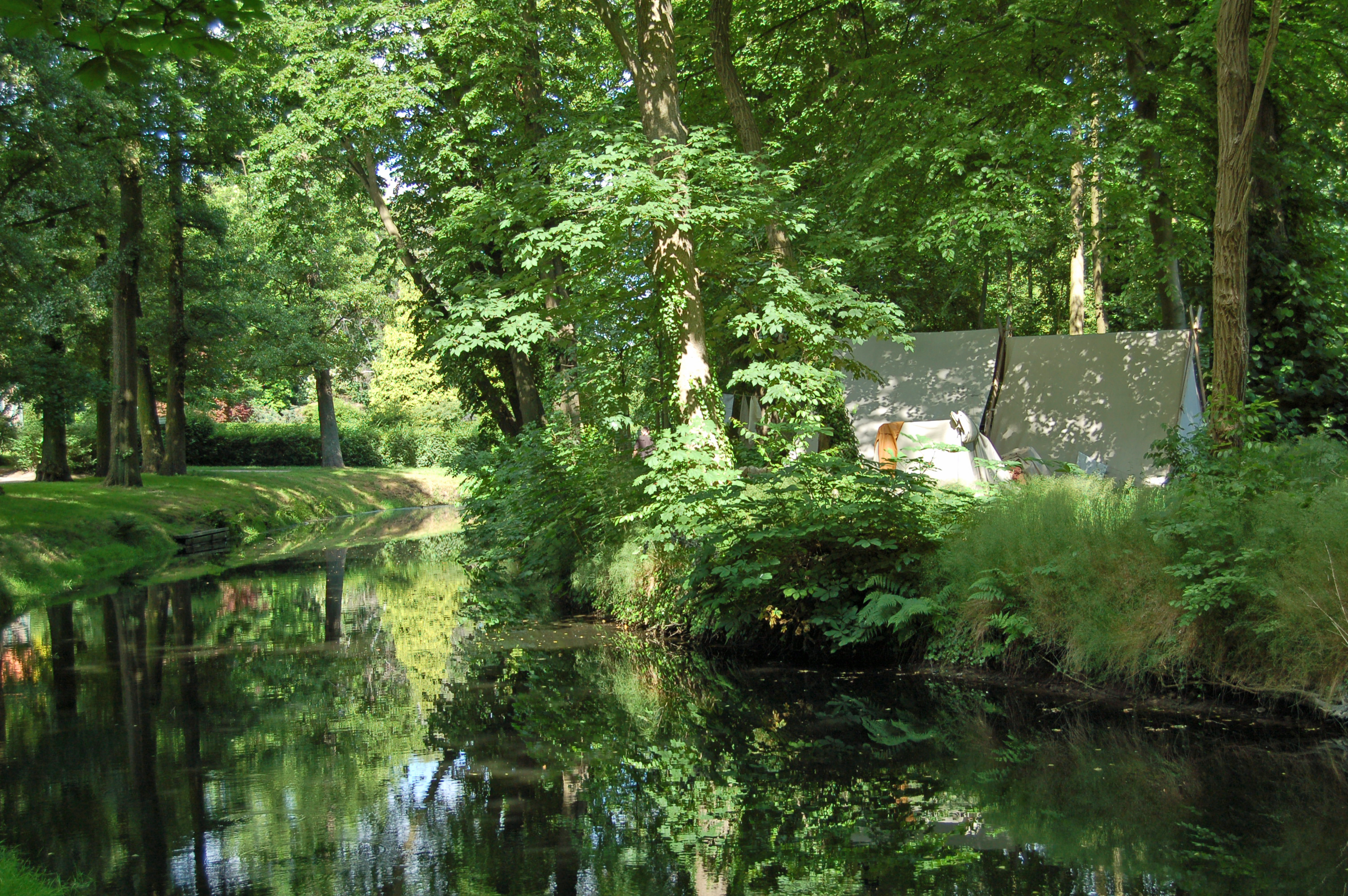 Der Platz des Markttreyben zu Ueterst End und der Burggraben der ehemaligen Burg der Ritter von Barmstede auf dem Klostergelände